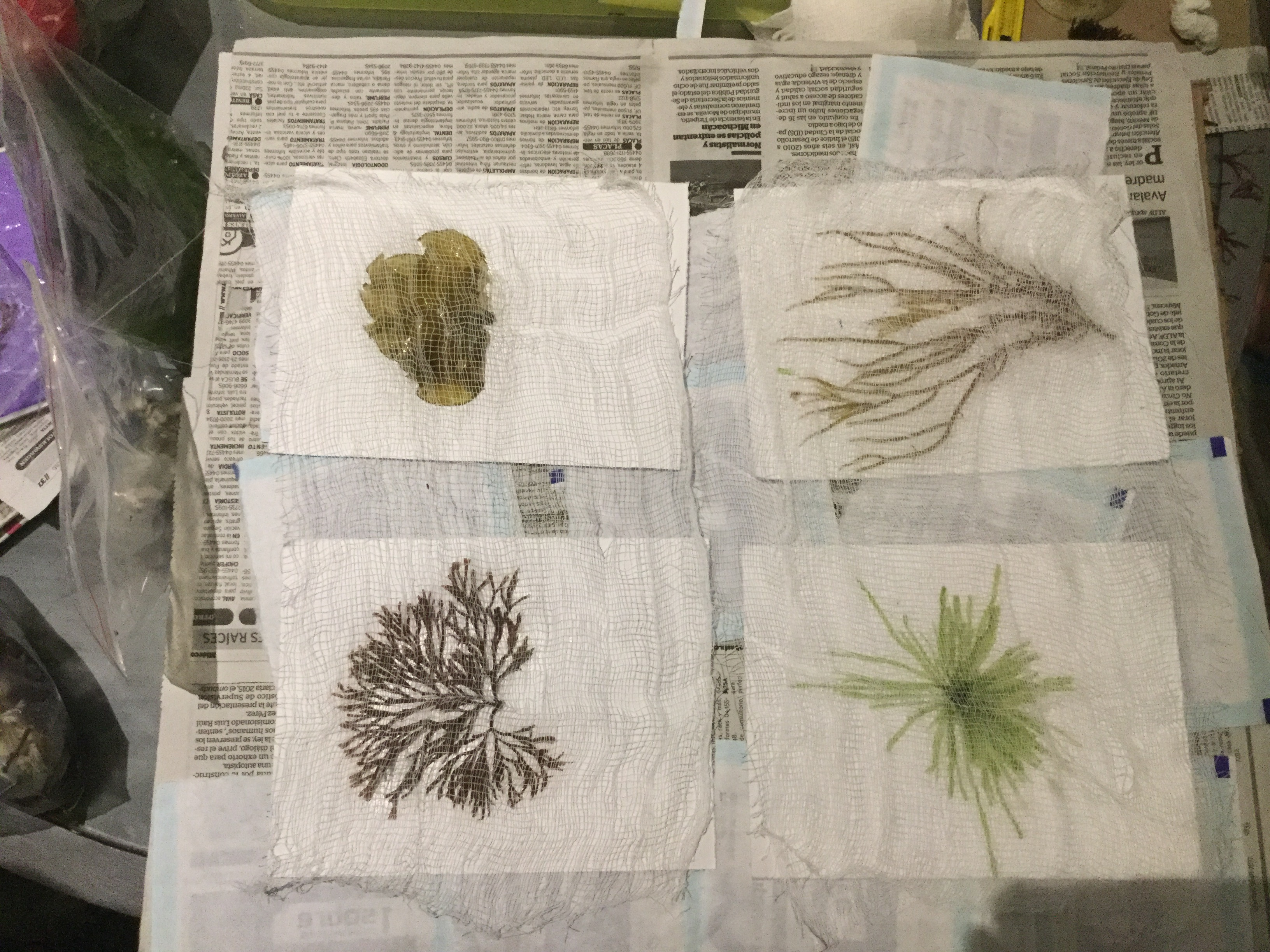 Herborización de distintos tipos de algas